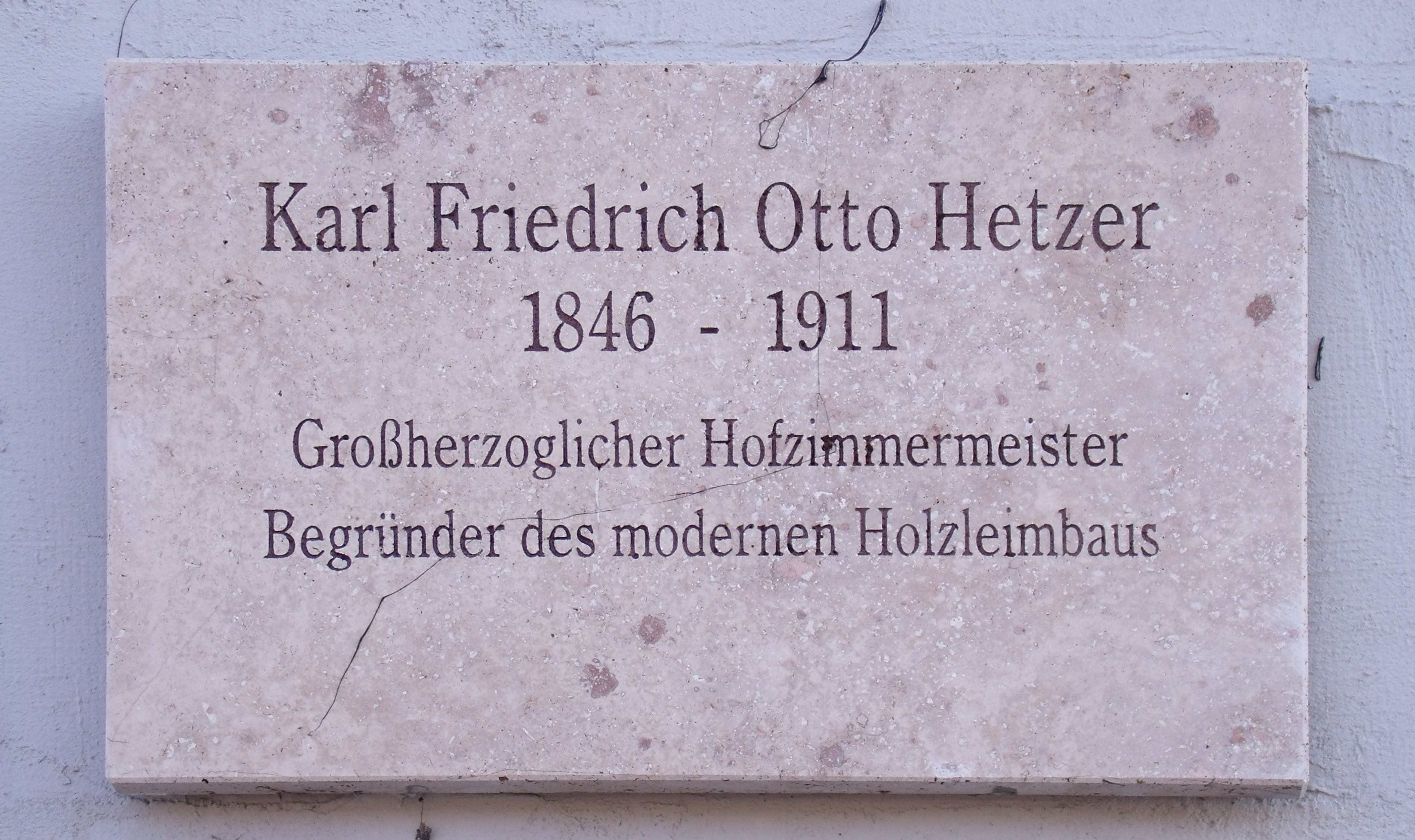 Otto Hetzer Tafel, an der Nordseite der sogenannten kleinen Hetzerhalle auf dem ehemaligen Gelände der Otto Hetzer Holzpflege- und Holzbearbeitung Aktiengesellschaft am Güterbahnhof, hinter der Marcel-Paul-Straße 57 in Weimar/Thüringen angebracht.